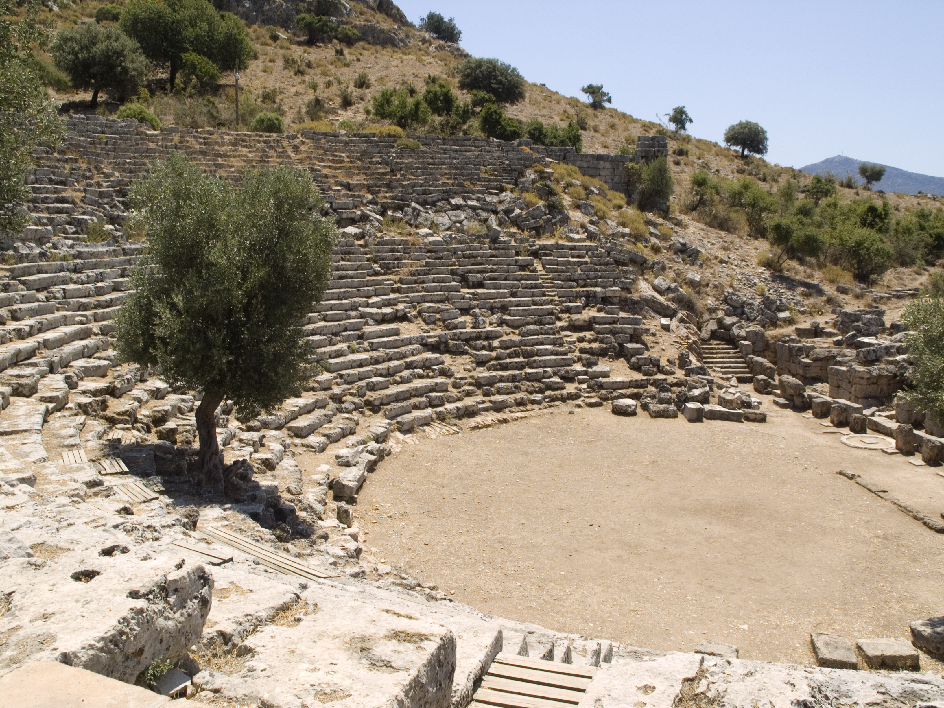 Турция, Дальян – античный город Кавн